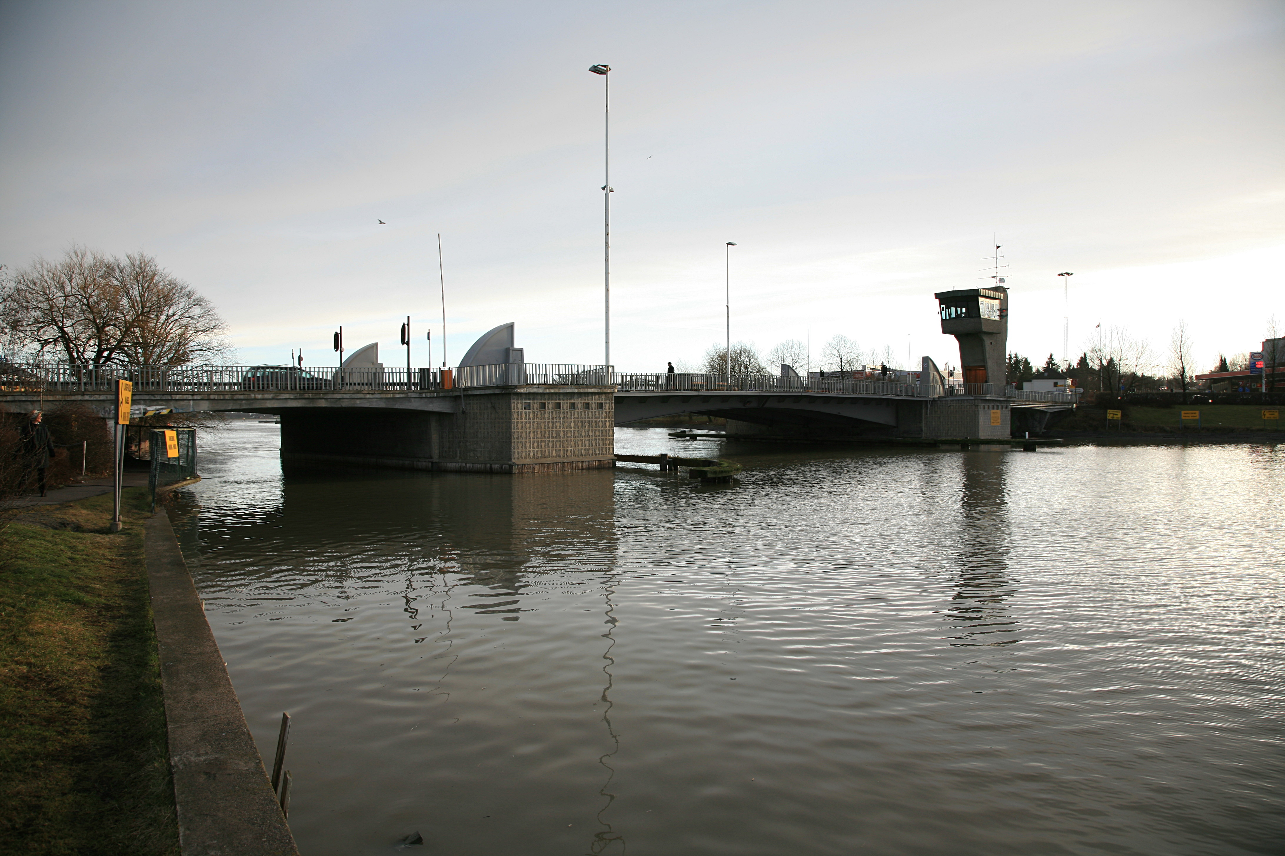 A bridge between Tønsberg anf Nøtterøy in Vestfold Norway